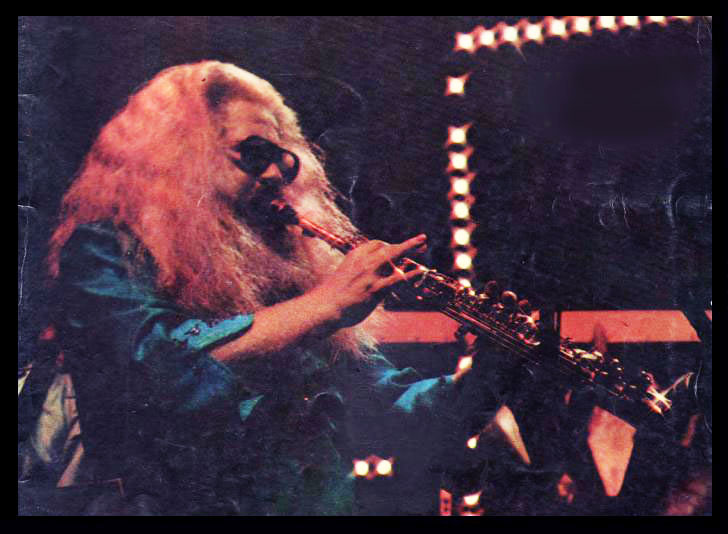 Foto de Hermeto Pascoal , Buenos Aires.